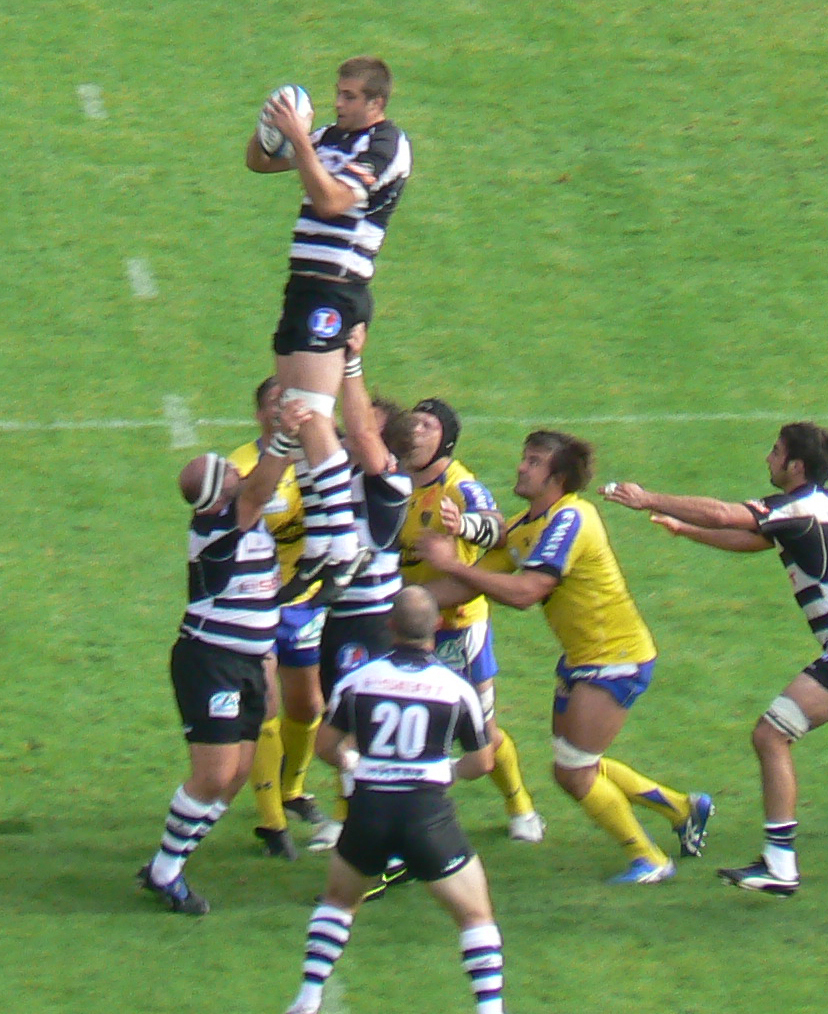 L'ASM Clermont Auvergne reçoit le CA Brive au stade Marcel-Michelin de Clermont-Ferrand